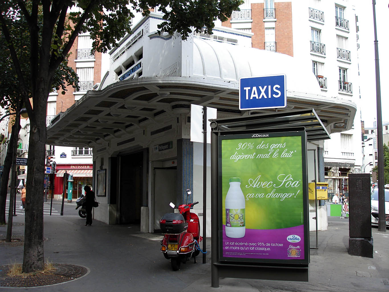 Station Pelleport de la ligne 3bis du métro de Paris, France